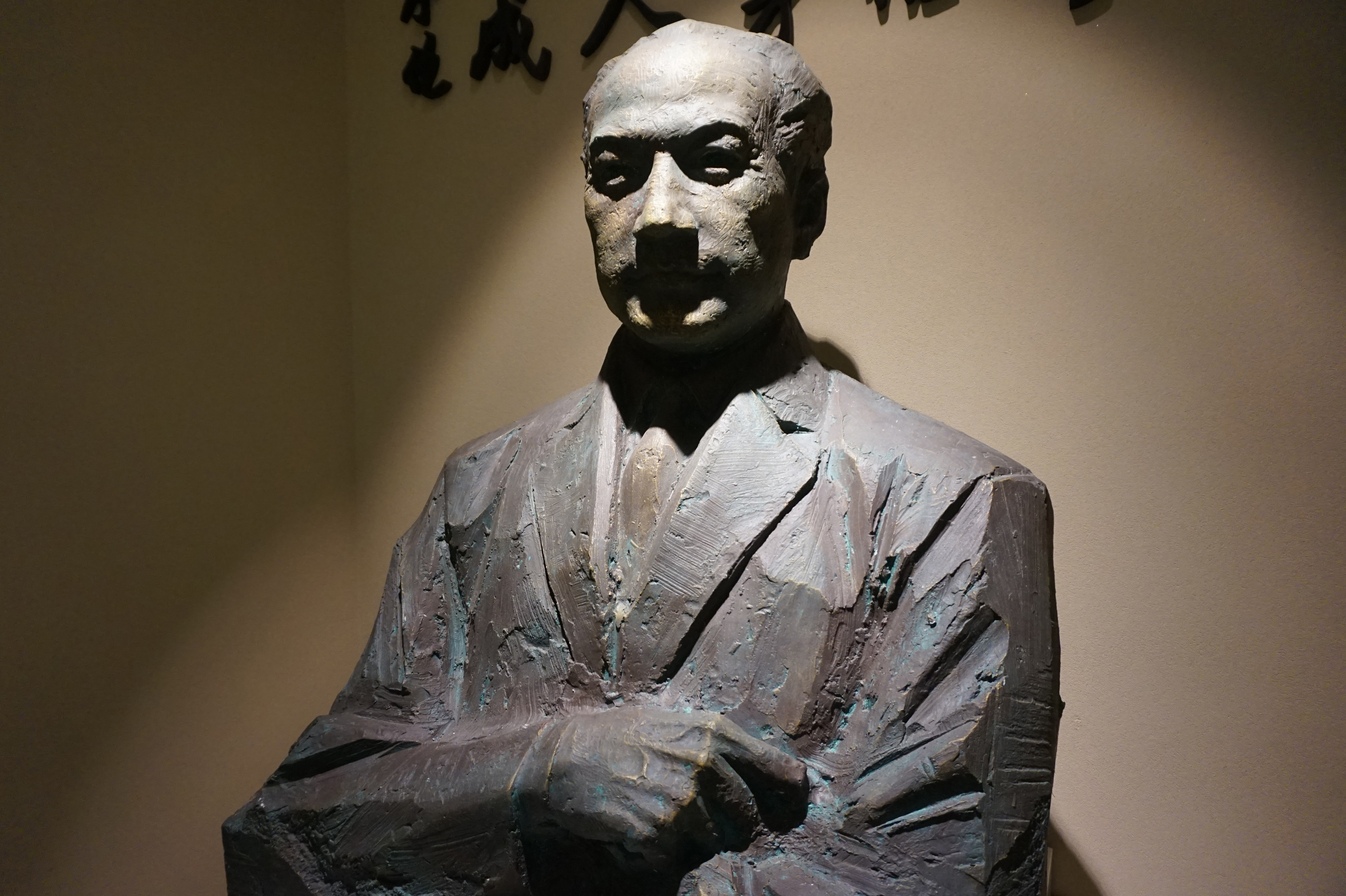 潘序伦铜像。中国财税博物馆藏。